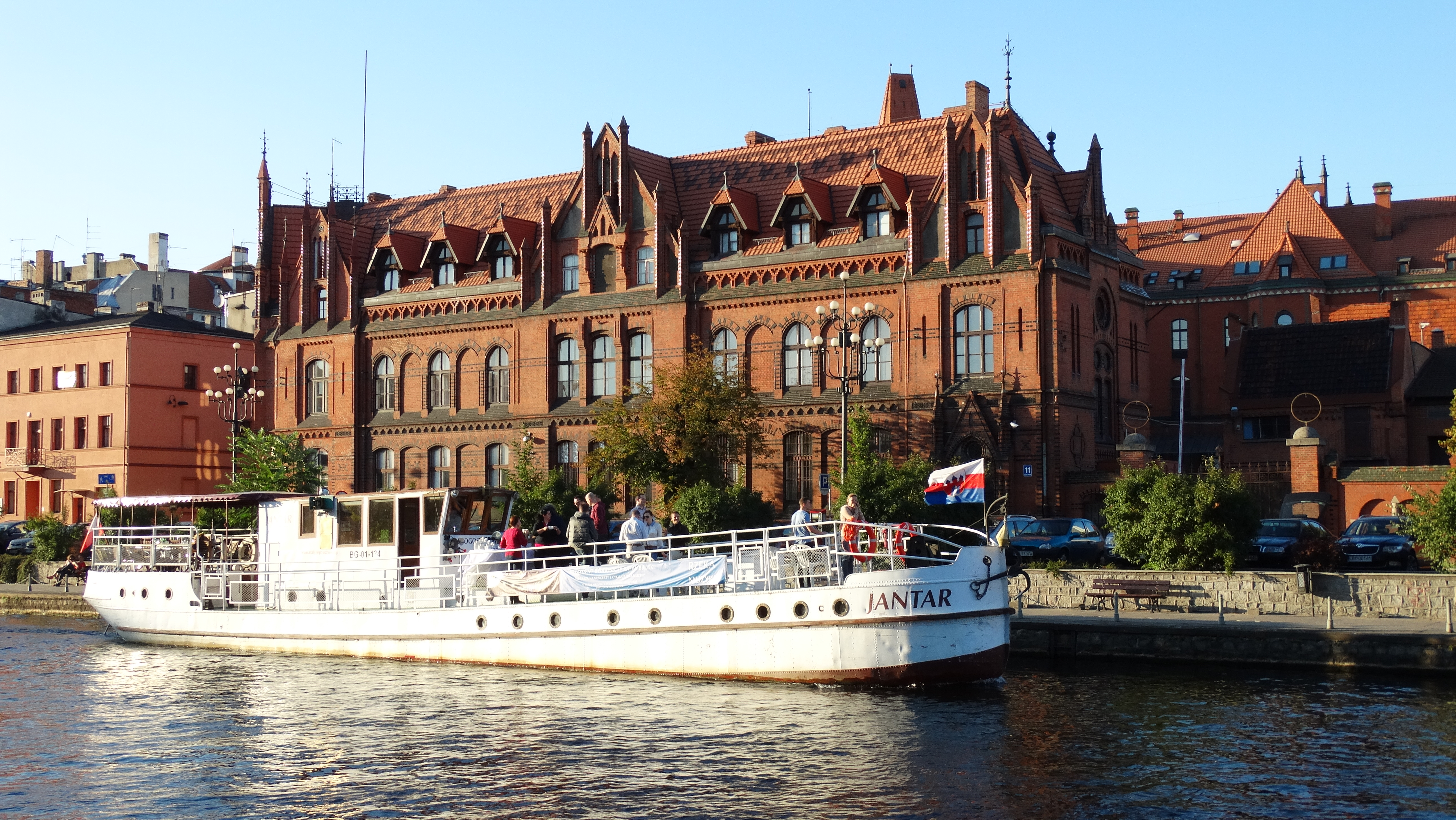 Bydgoszcz, Poczta Główna, 1883-1885, 1896-1899